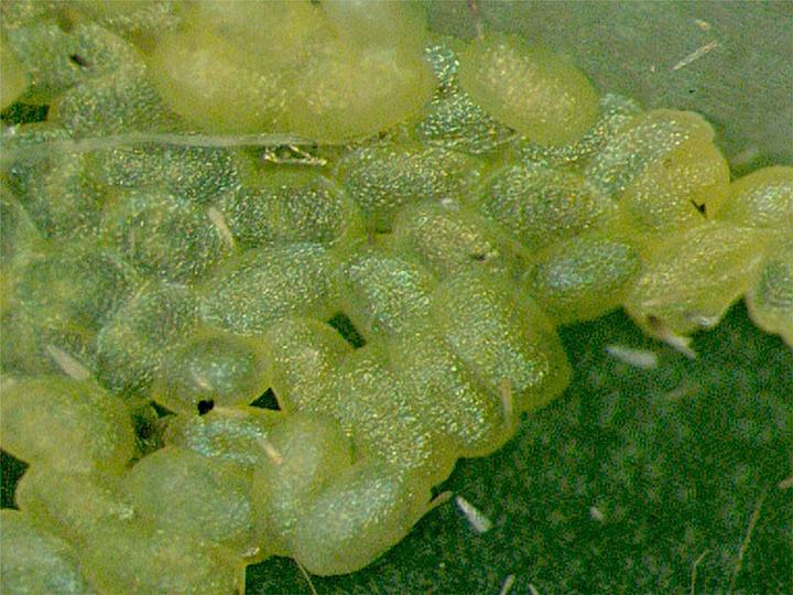 Plutella xylostella eggs